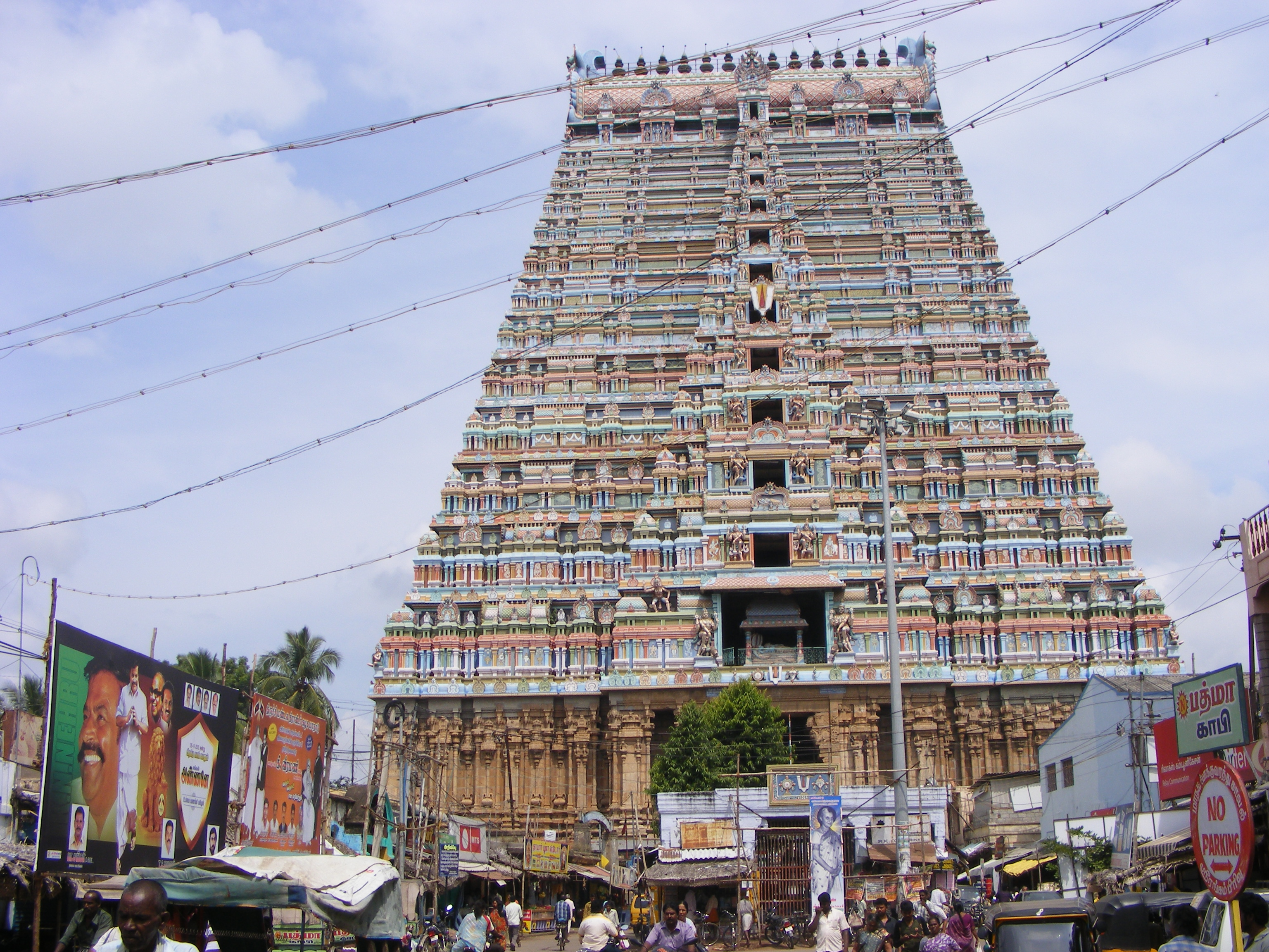 ശ്രീരംഗനാഥ ക്ഷേത്രം